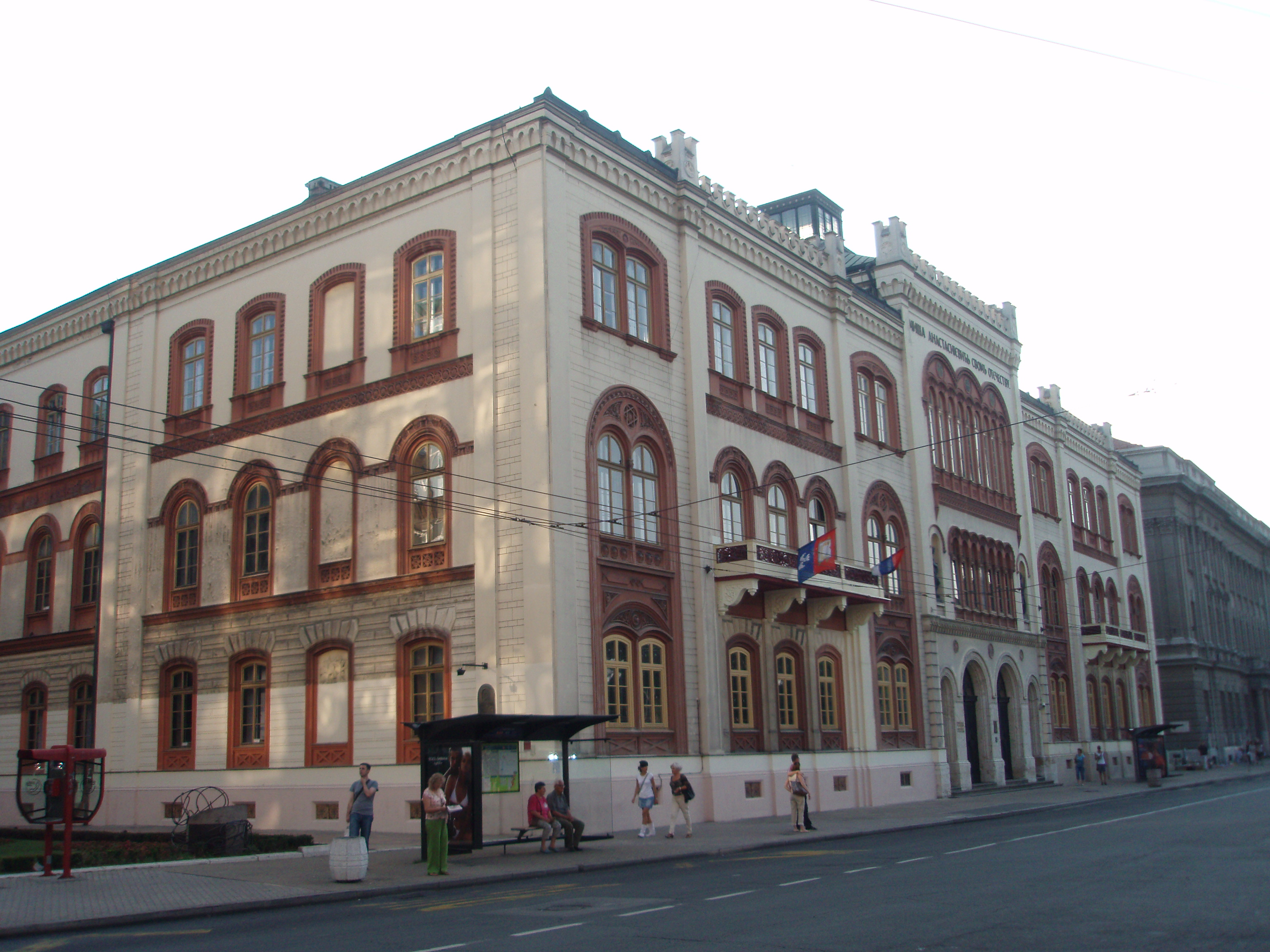 Kapetan-Mišino zdanje